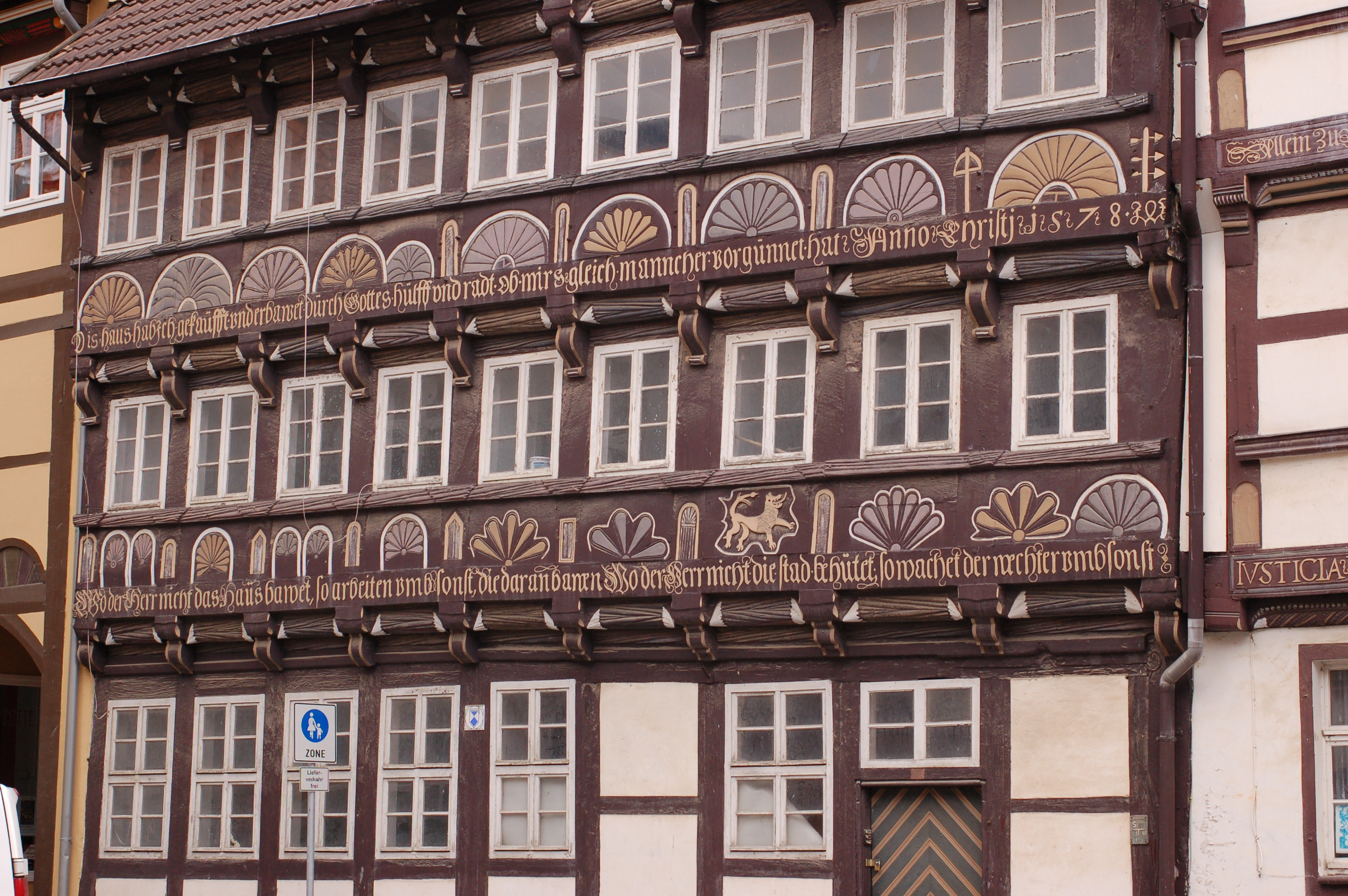 denkmalgeschütztes Haus in der Altstadt von Osterwieck